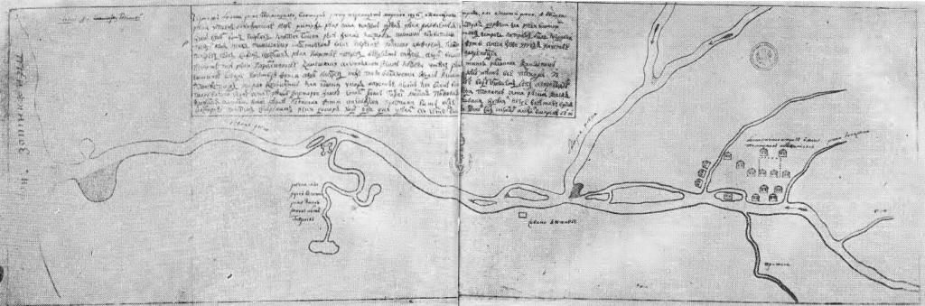 Чертёж Большерецка, составленный В. И. Казанцевым.